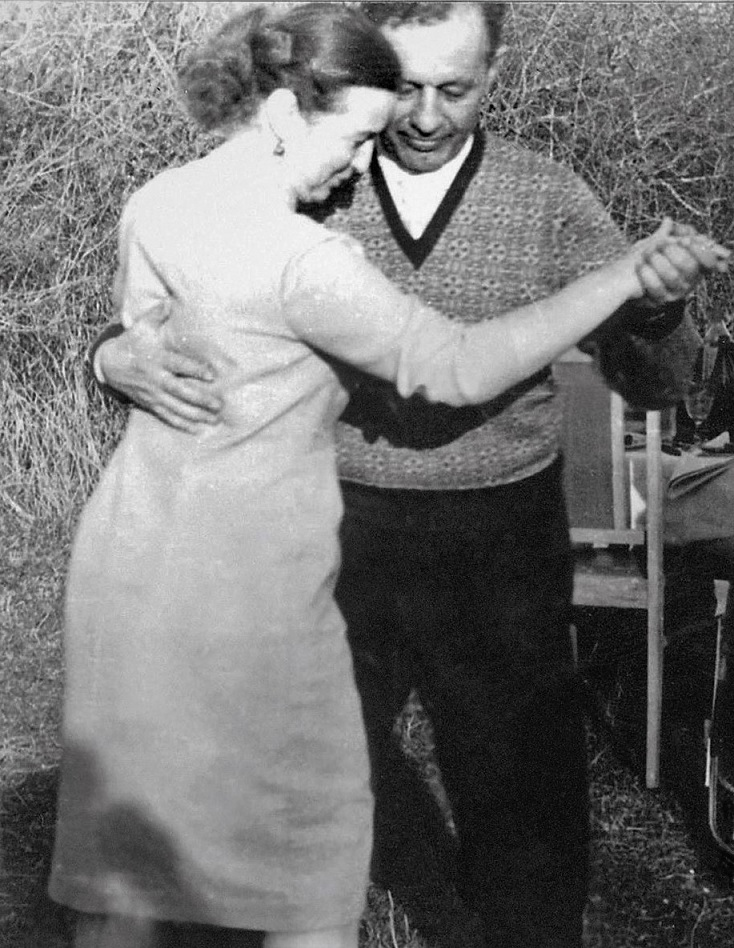 Амазасп Бабаджанян танцует со своей женой Аргуньей Аршаковной